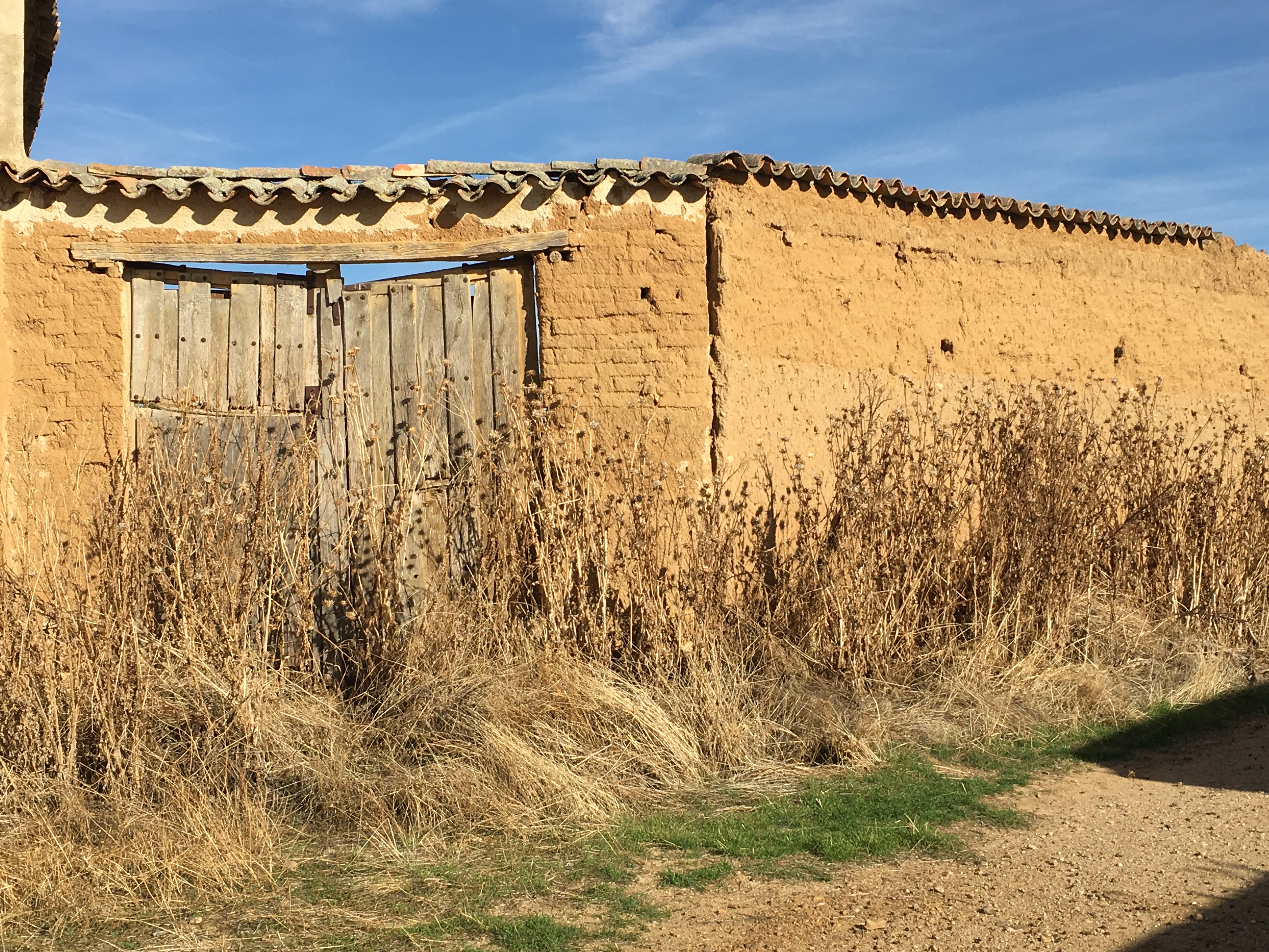 Villaesper Milenario